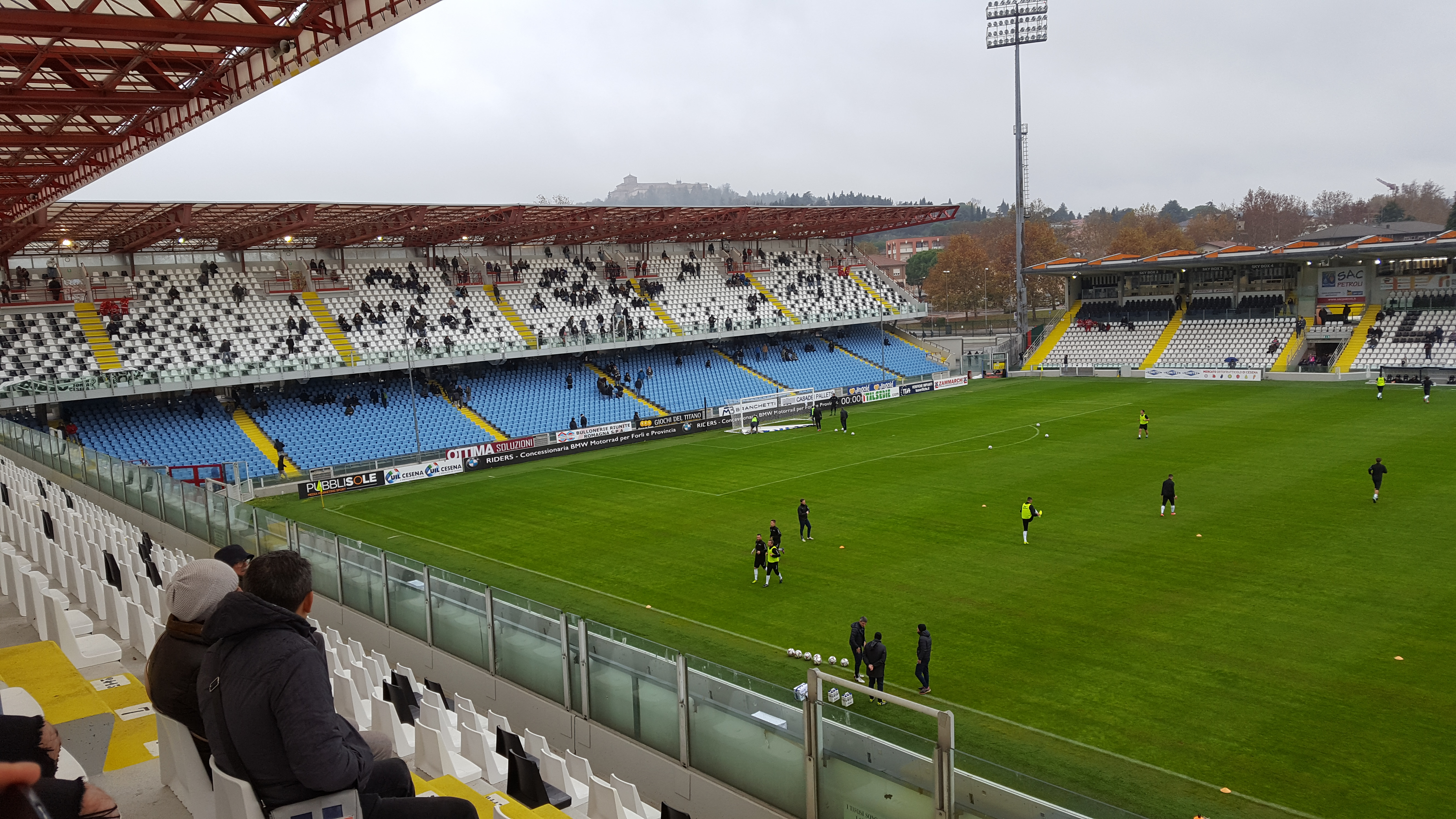 Una veduta della curva mare e del campo da gioco